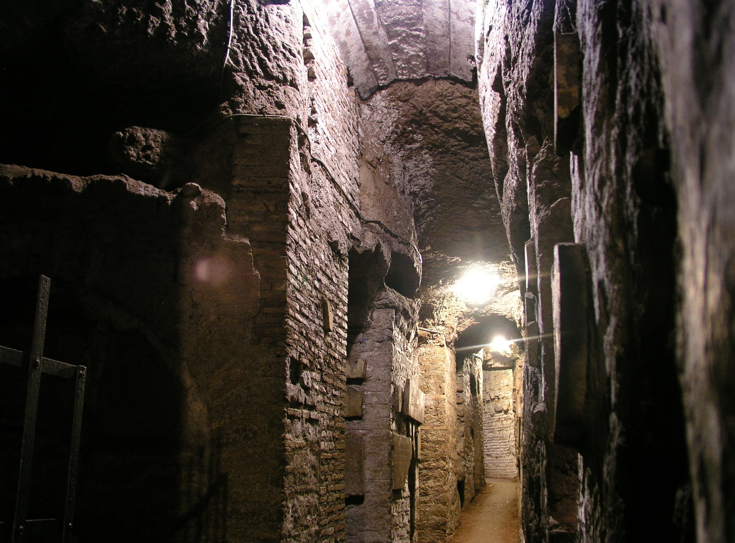 Rom, Domitilla-Katakomben, Gang mit Wandgräbern